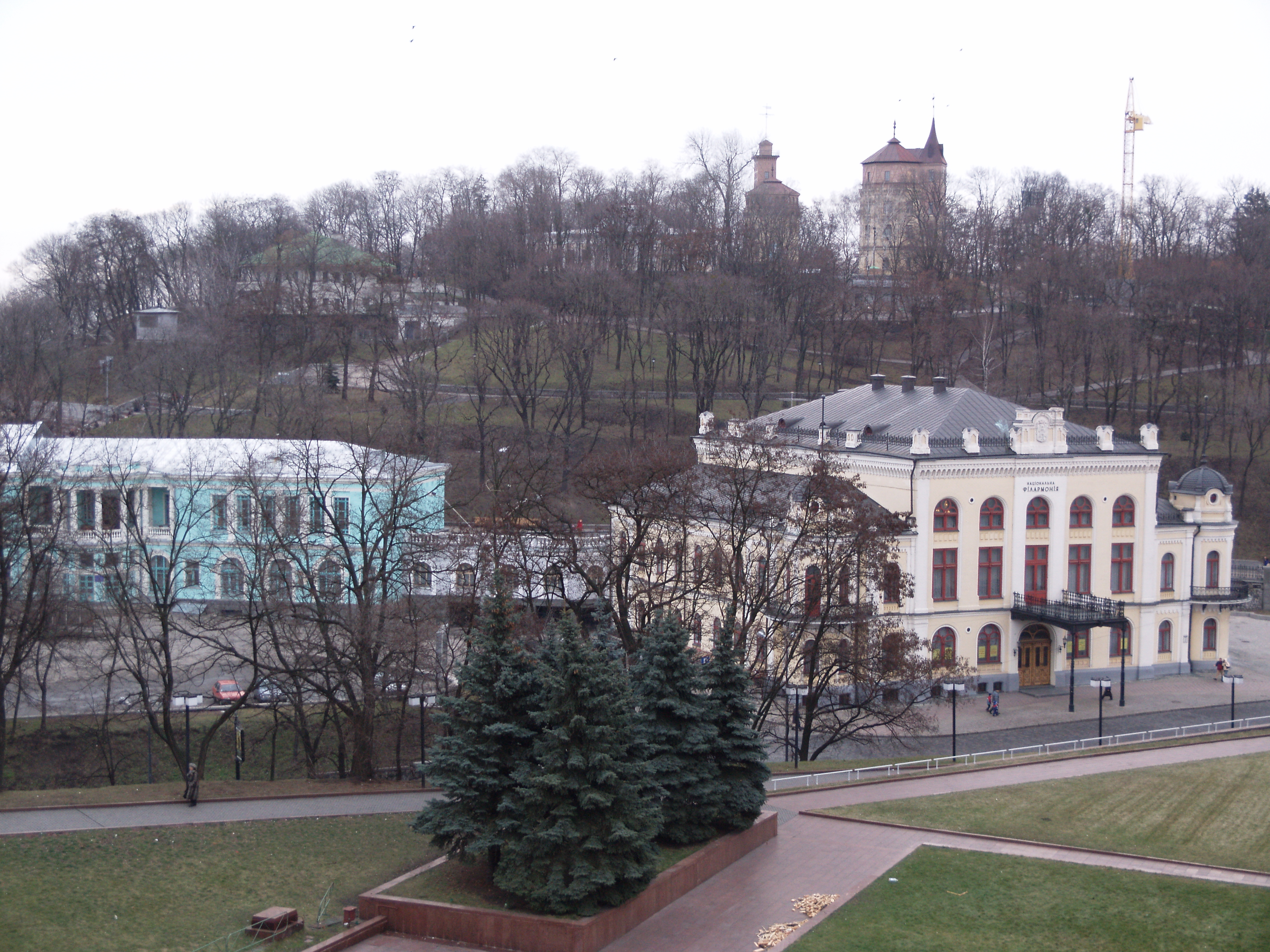 Україна, Київ - Будинок Купецького зібрання (Національна філармонія)